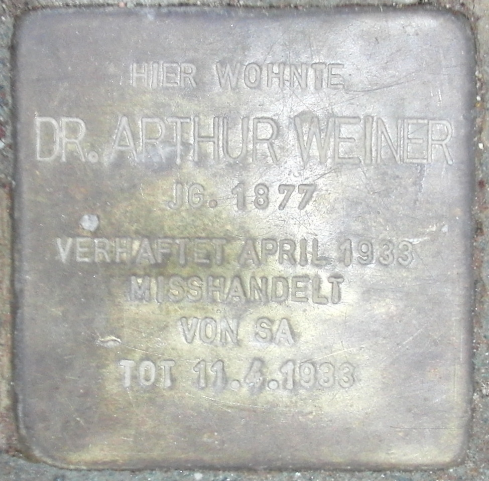 Hier wohnte Dr. Arthur Weiner Jg. 1877 verhaftet April 1933 misshandelt von SA tot 11.4.1933 [Adresse: Stollberger Straße 41, heute im Bereich Straßenbahnhaltestelle Parkstraße stadtwärts]